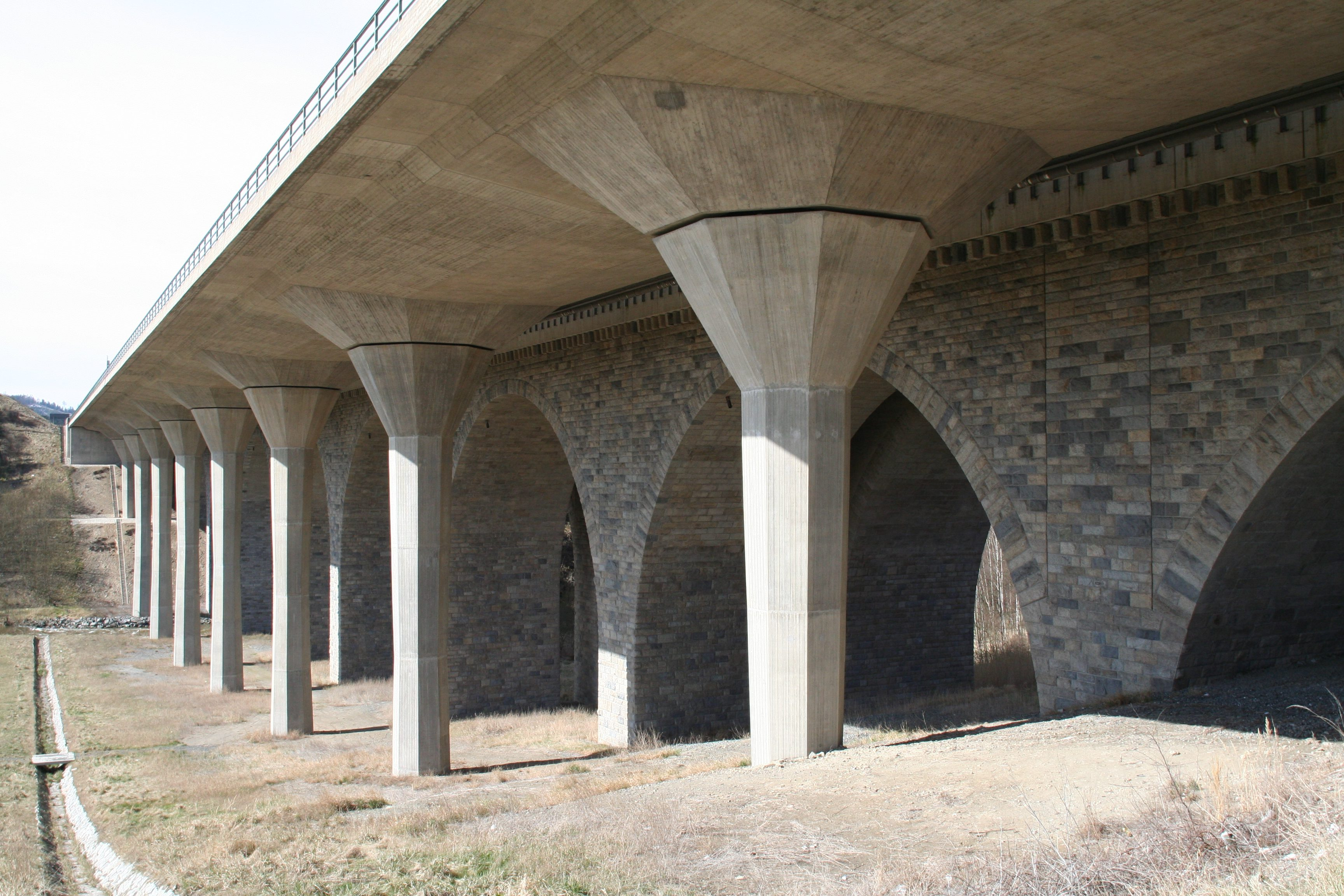 Saalebrücke Rudolphstein (Brücke der Deutschen Einheit) der A9, bei Lehesten Ortsteil von Hirschberg im Saale-Orla-Kreis; Blickrichtung Nord-West, vorne Überbau Fahrtrichtung Berlin